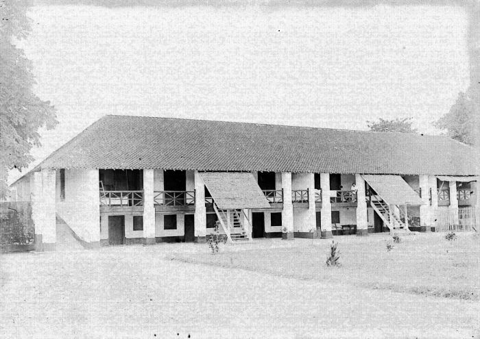 Negatief. Fort Benteng te Maros, Celebes